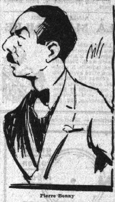 Caricature de Pierre Bonny lors du procès Volberg, parue dans le Petit Parisien, 29 octobre 1935